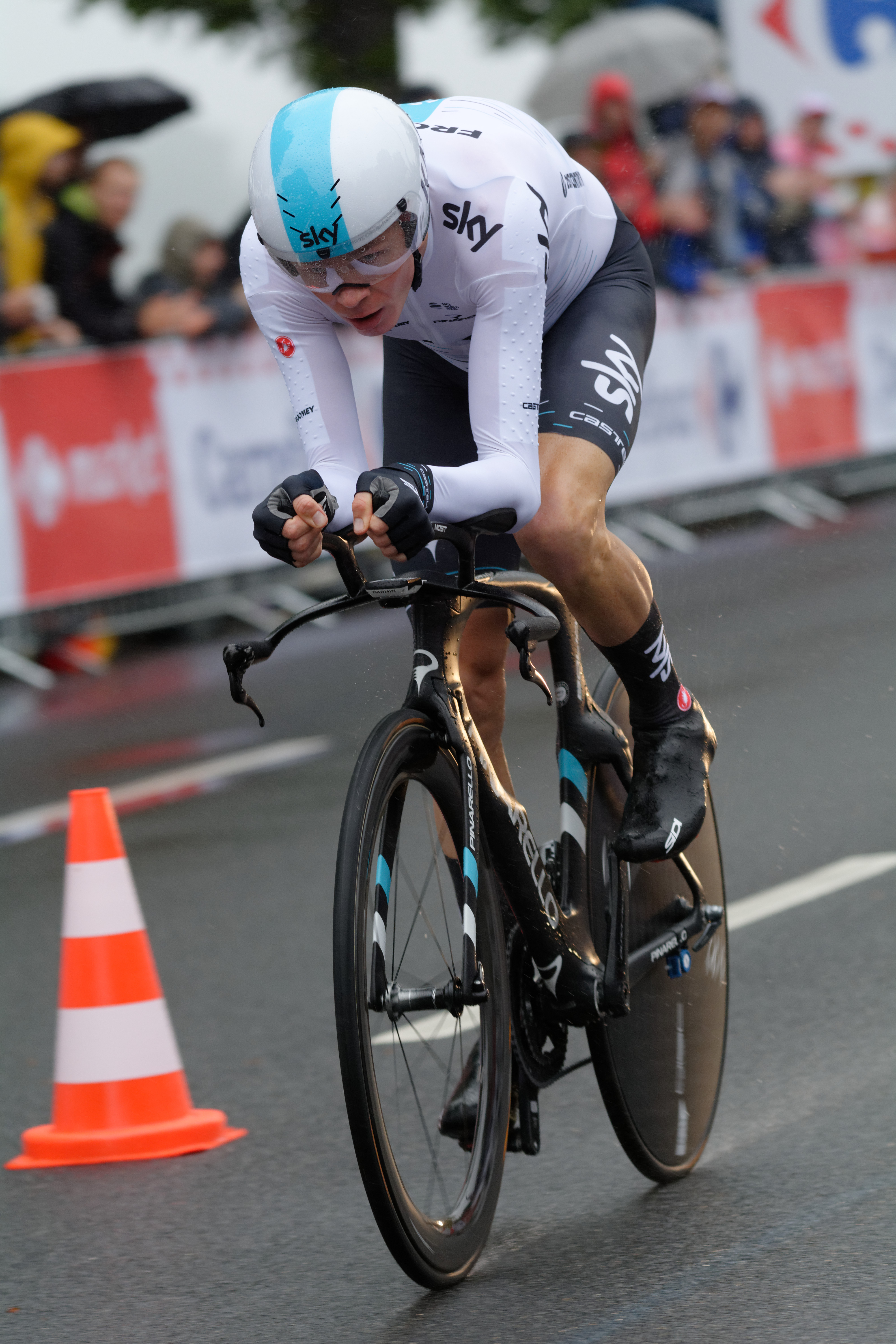 Tour de France 2017 Stage 1 Duesseldolf